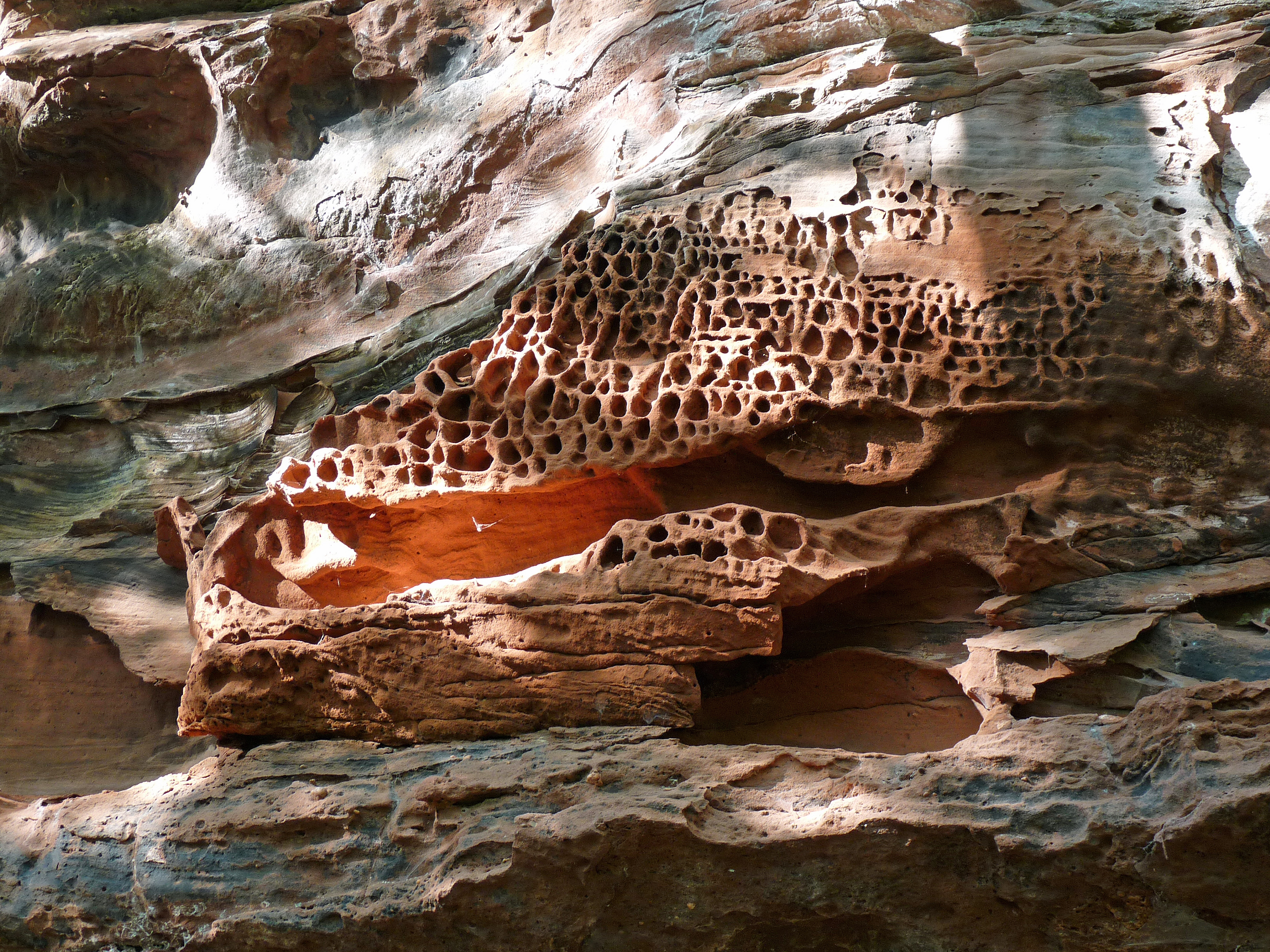 Erbsenfelsen (Moselle) : nids d'abeilles (météorisation alvéolaire)